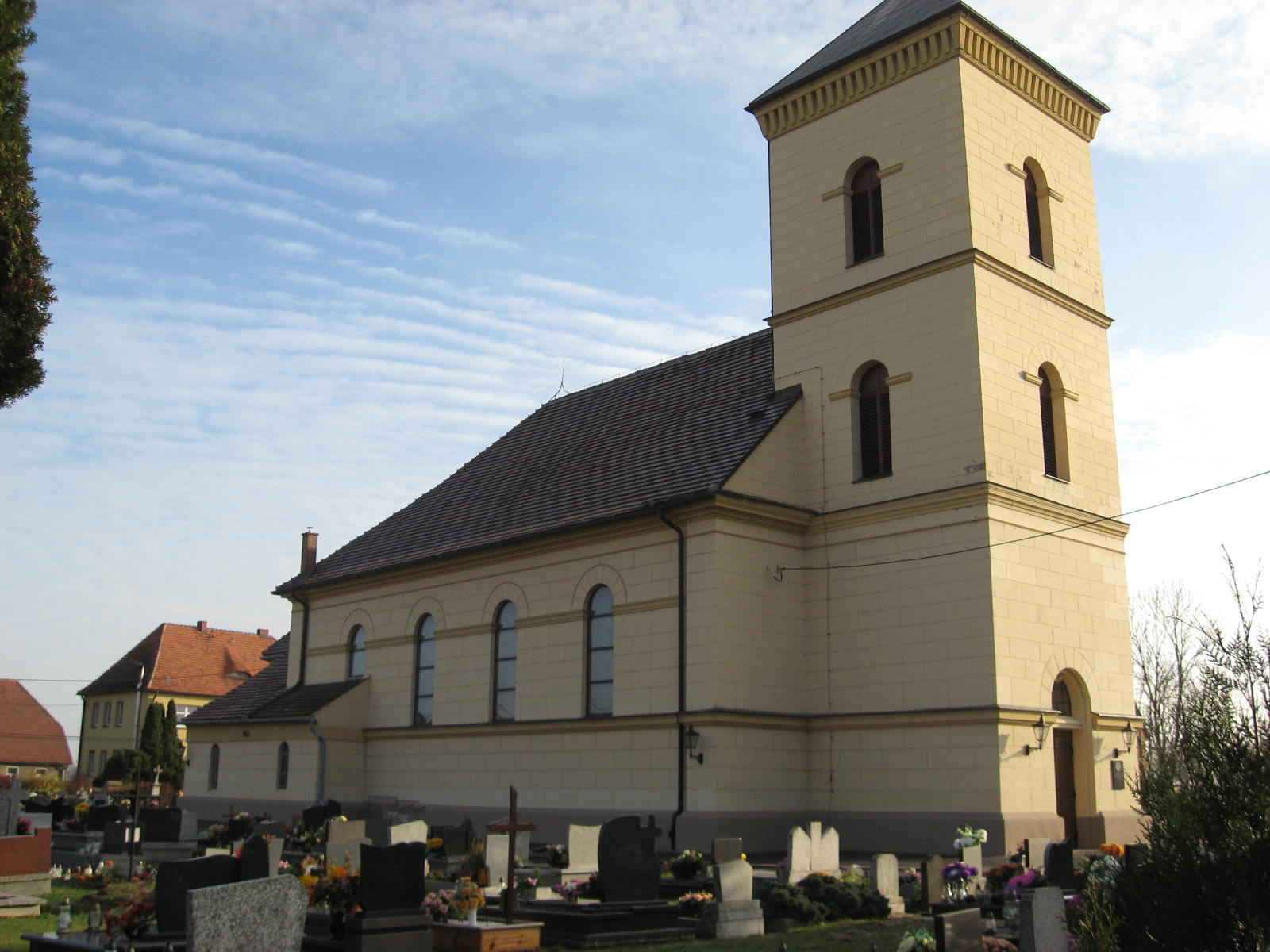 Kościół Nawiedzenia NMP w Łowkowicach